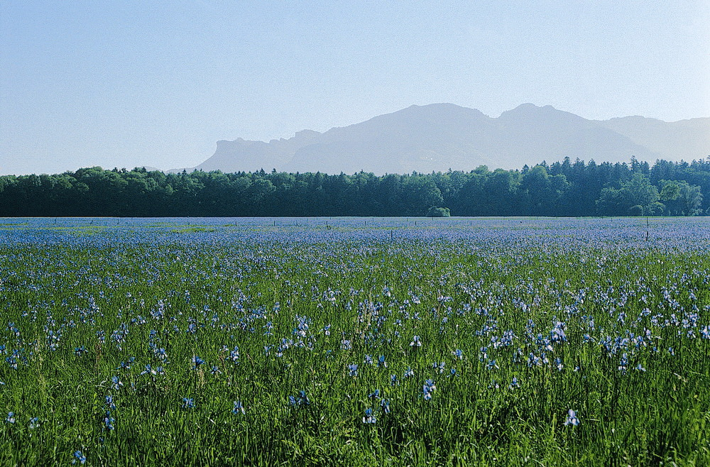 Irisblüte im Unterried (Natura 2000-Gebiet Bangs-Matschels, Feldkirch, Vorarlberg)